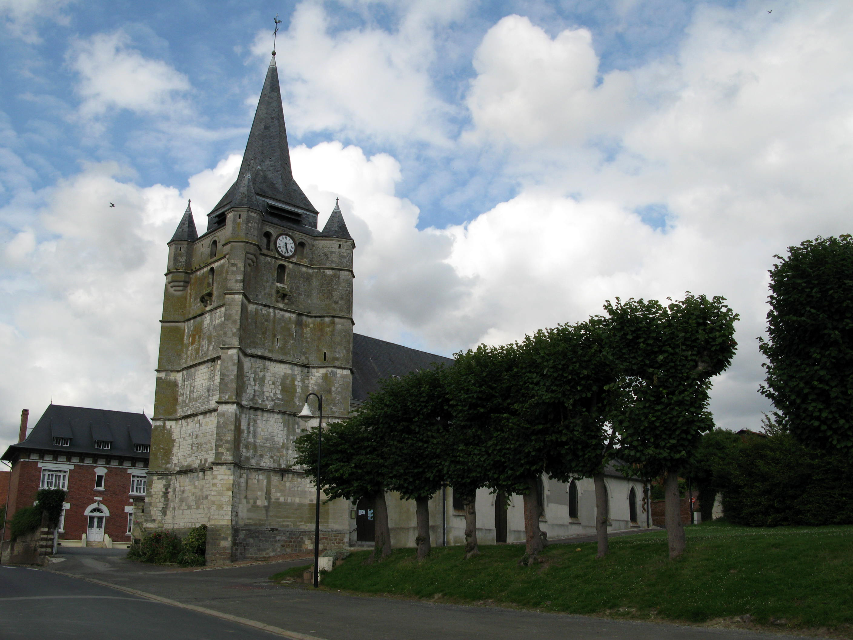 Cappy (Somme, France) - L'église.